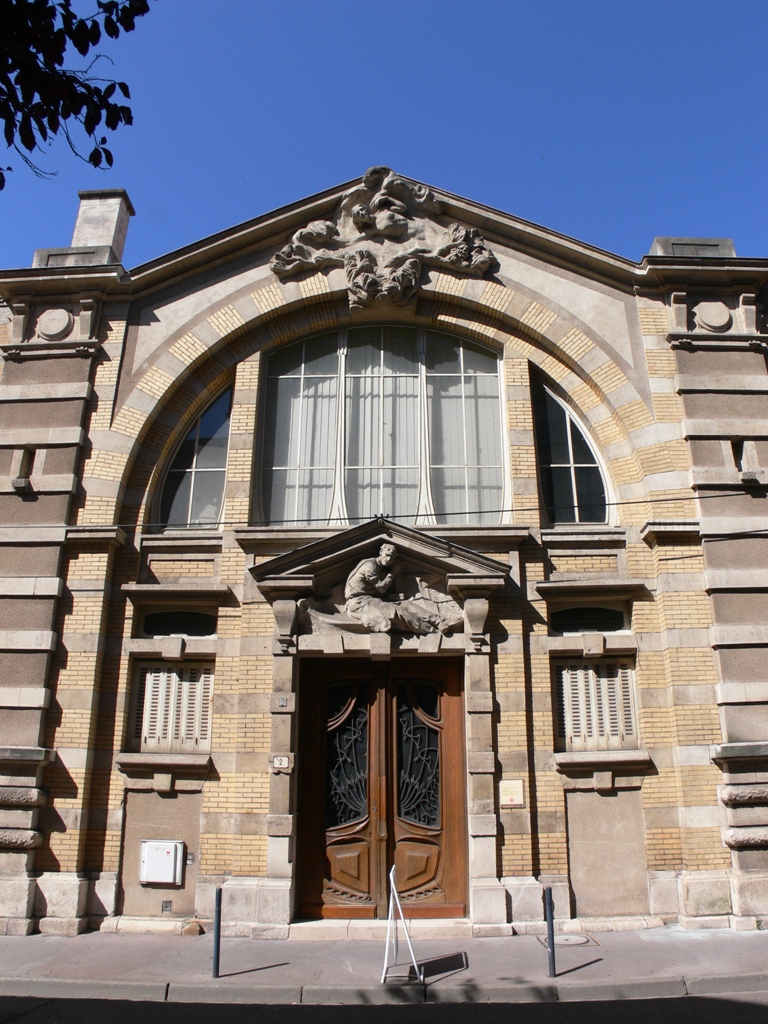 Maison du Peuple à Nancy, Lorraine, France. Les allégories sculptées sont dues à Victor Prouvé